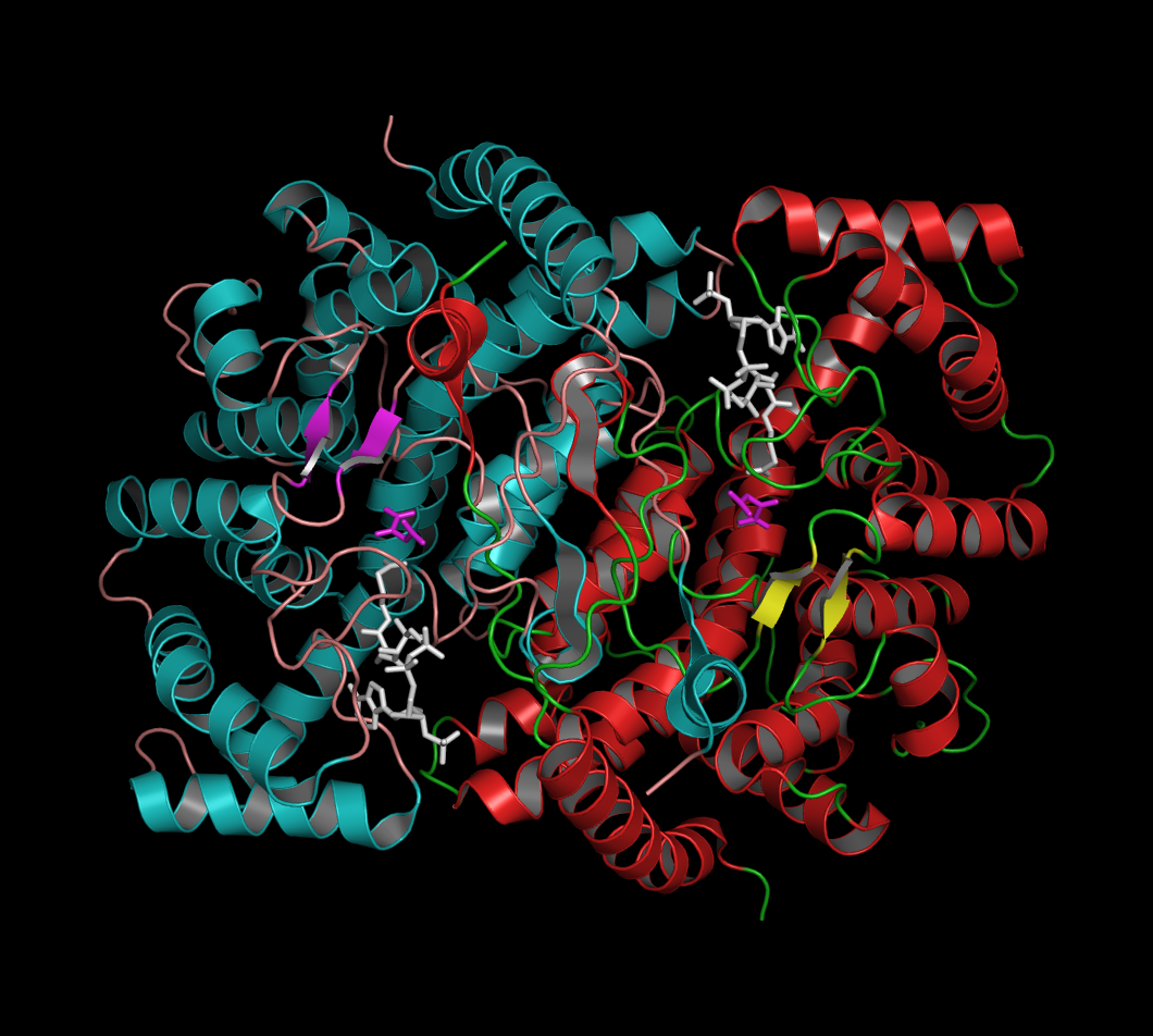 Quartärstruktur der Citratsynthase des Huhns mit gebundenem Oxaloacetat (magenta) und Acetyl-CoA-Analogon (CMX, weiß). Abbildung erstellt aus pdb 1CSI ( mit pymol 0.99 ; Asymmetrische Einheit ein dargestellt durch rote Helices und gelbe Faltblätter, Einheit zwei mit cyanfarbenen Helices und magenta Faltblätter.